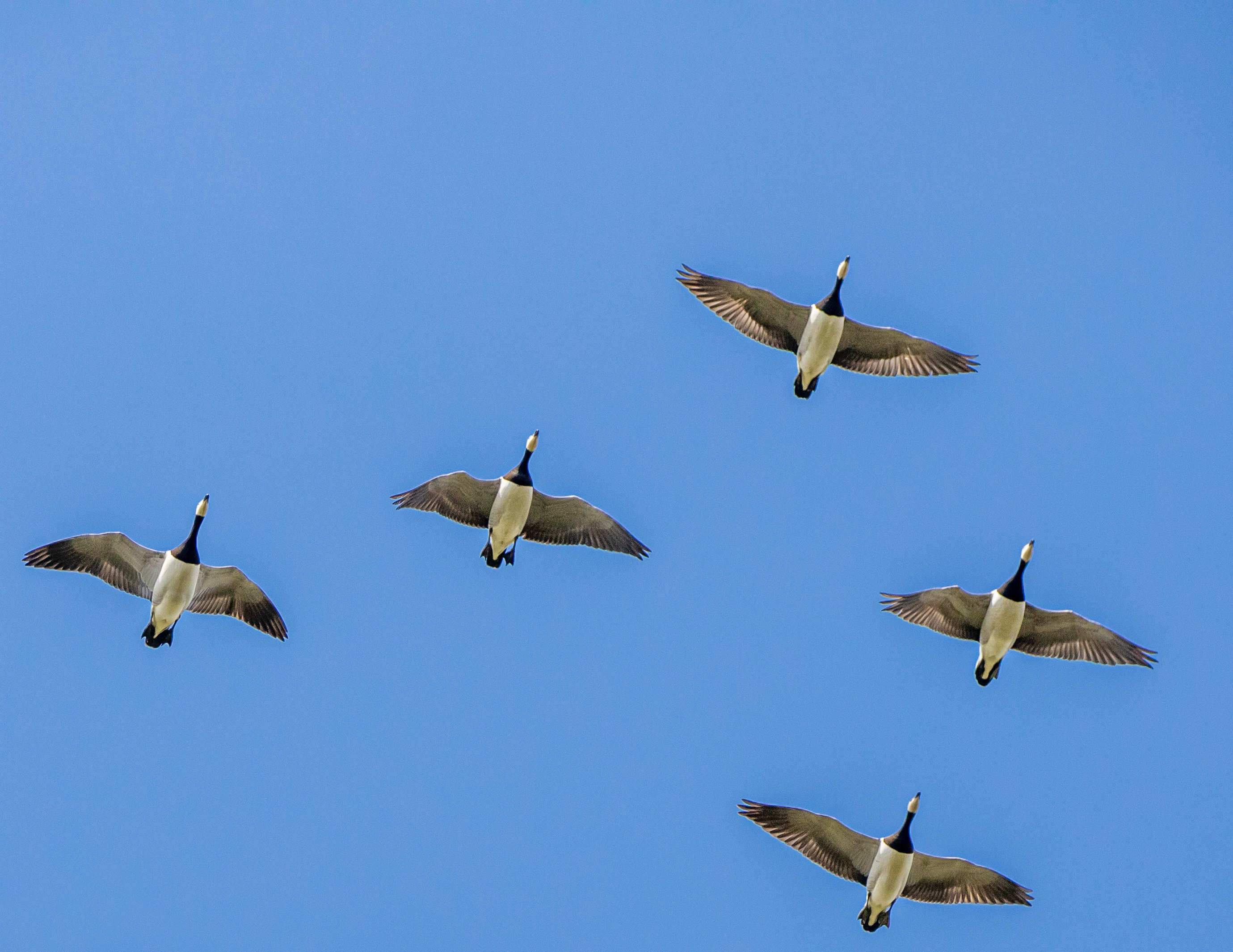 Nonnengänse über dem Ramsargebiet Schleswig-Holsteinisches Wattenmeer und angrenzende Küstengebiete